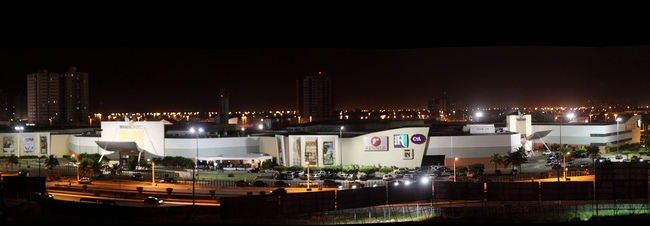 Shopping Jardins em Aracaju, Sergipe, Brasil. License on Flickr (2011-02-15): CC-BY-SA-2.0